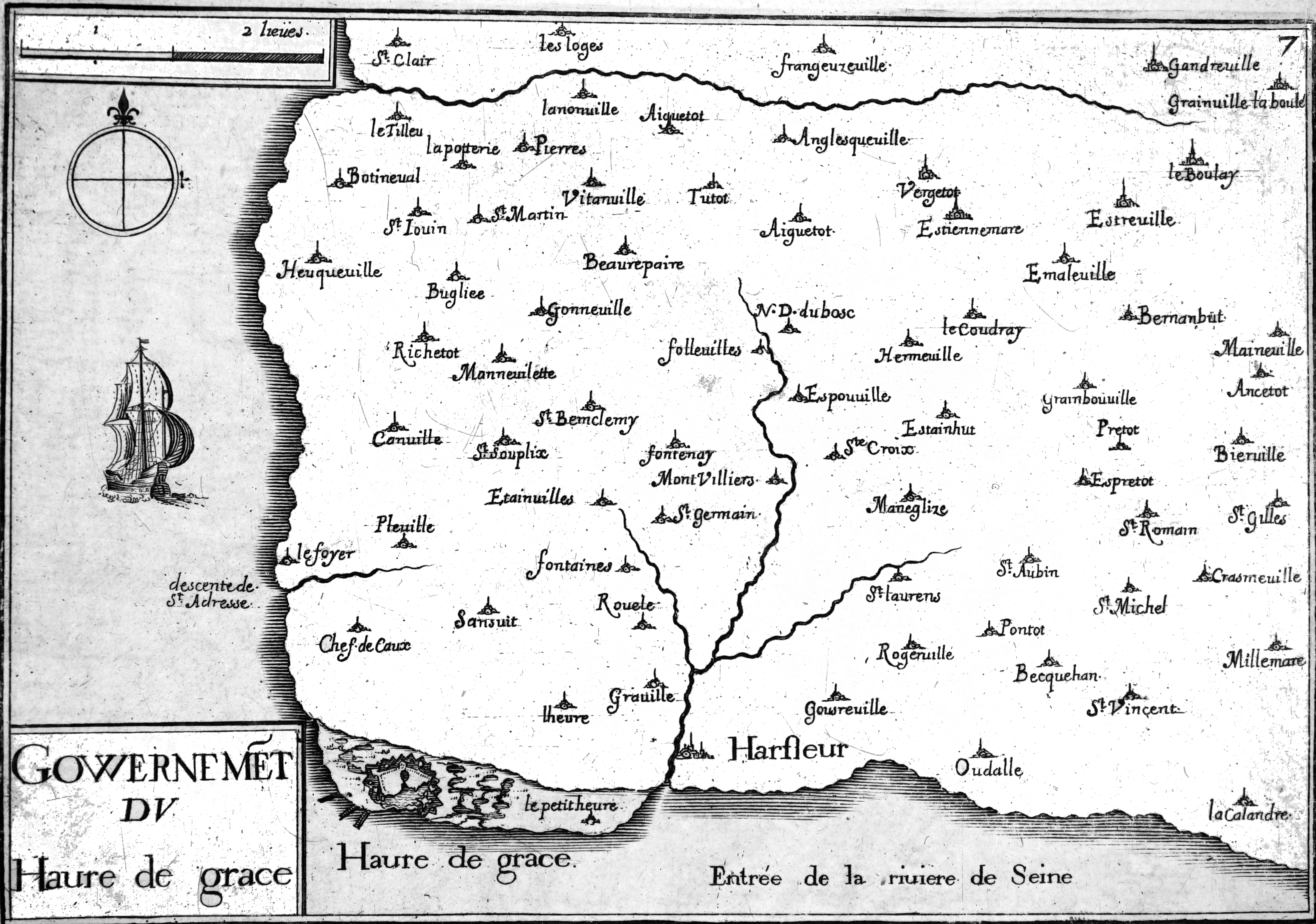 sur un dessin de Tassin dans Plans et profils...'.